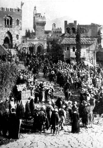 Fotogramma del film muto Frate Francesco, regia Giulio Antamoro (1877-1945), produz ICSA Firenze Rifredi, 1926